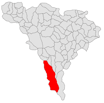 Categorie:Hărţi ale judeţului Alba